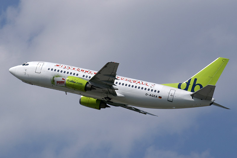 dba Boeing 737-300 D-AGEA at Stuttgart Airport